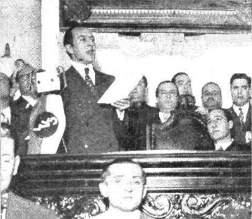 Amadeo Sabattini dirige su discurso a la asamblea legislativa de la Provincia de Córdoba, al asumir en 1936 como Gobernador.